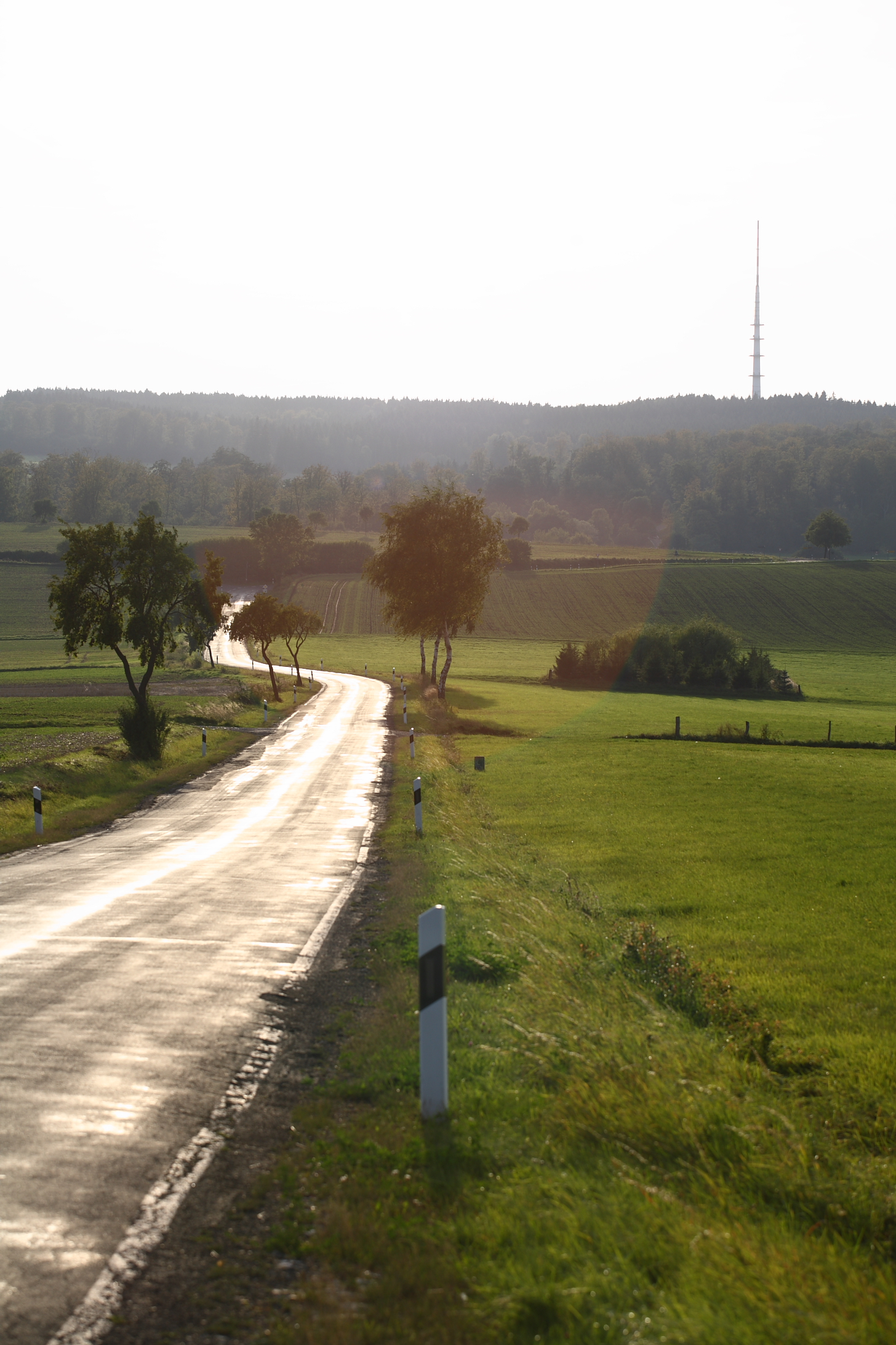 Fernmeldeturm Solling aus dem Espoldetal bei Espol bzw. aus Richtung des Höhenzugs Weper betrachtet